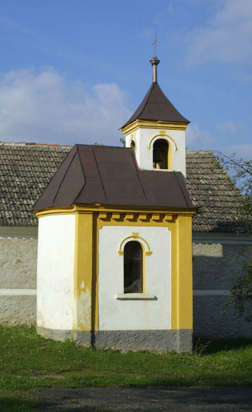 Kaplička v Lednici, okres Plzeň-sever.